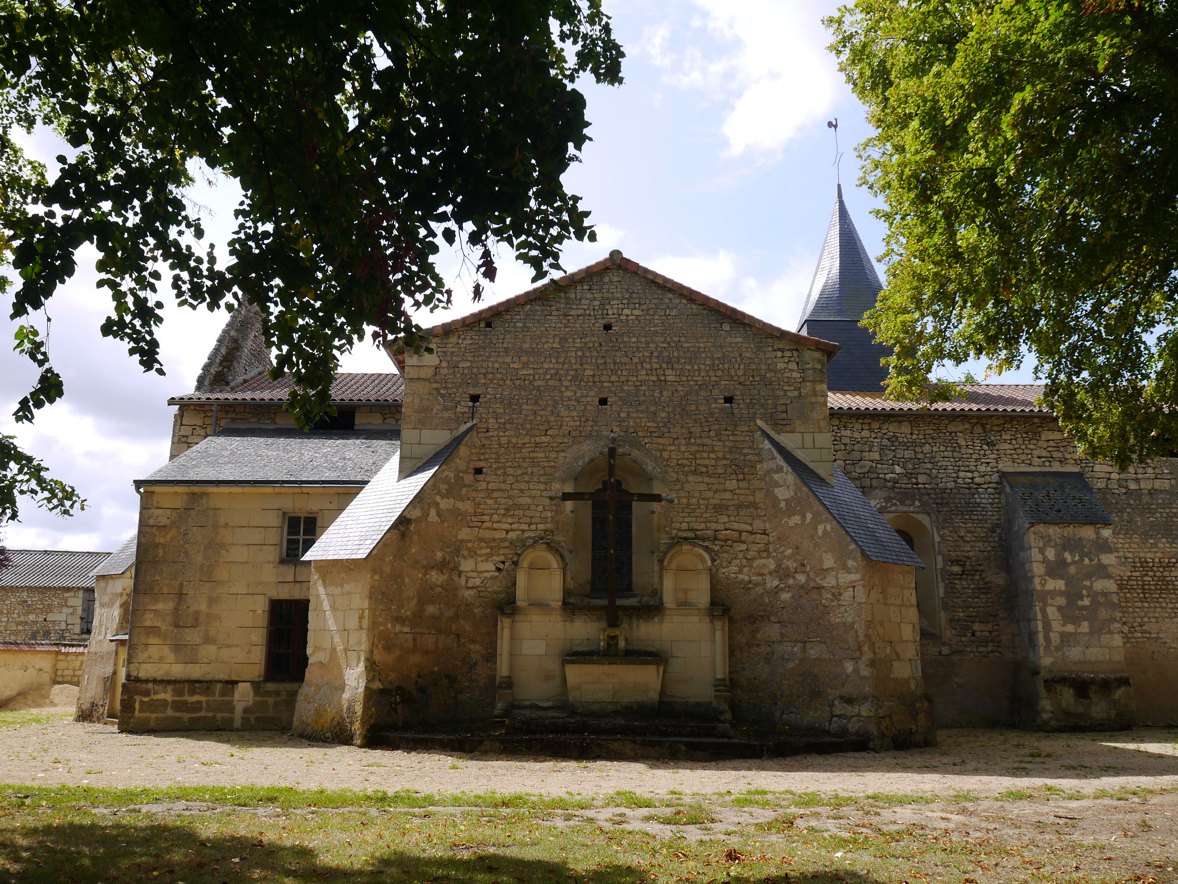 L'église Saint-Macaire.